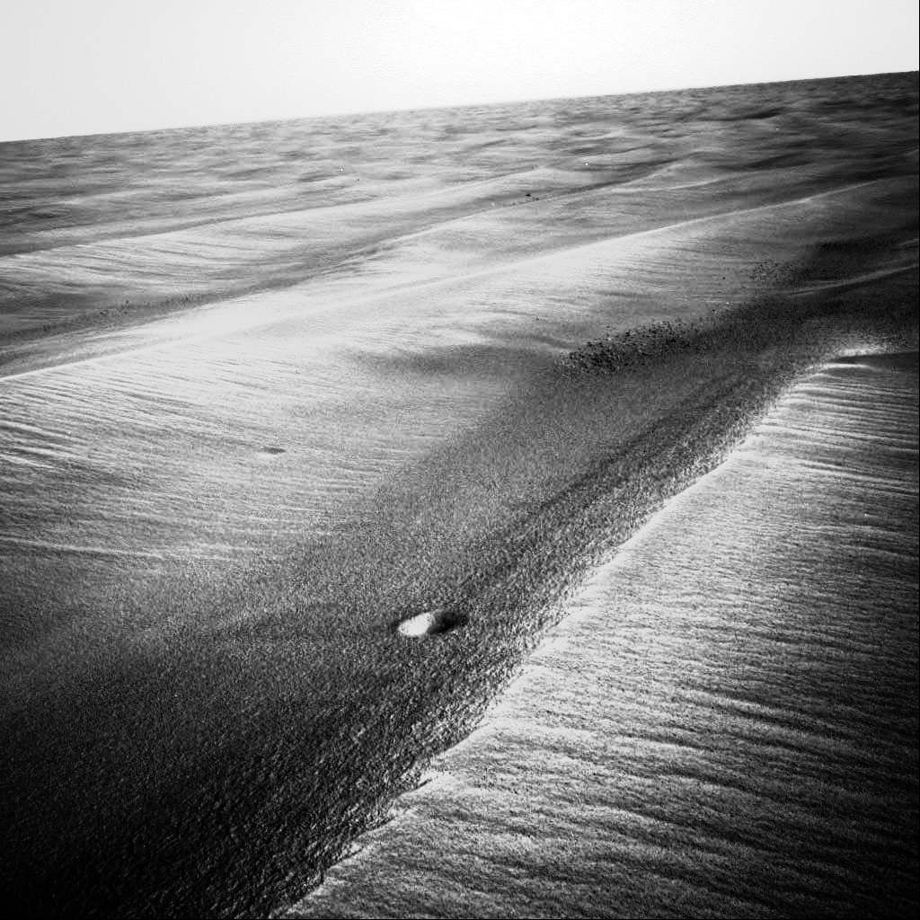 Dieses Bild basiert auf dem Bild 113766main 04272005 tinyCrators.jpg, welches gemeinfrei („public domain“) ist. Der Urheber des Bildes 113766main 04272005 tinyCrators.jpg ist die NASA.